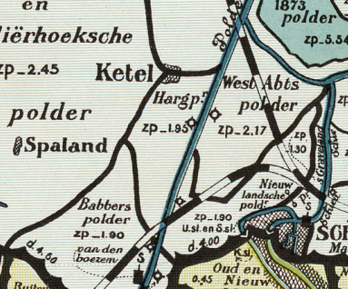 Hargpolder